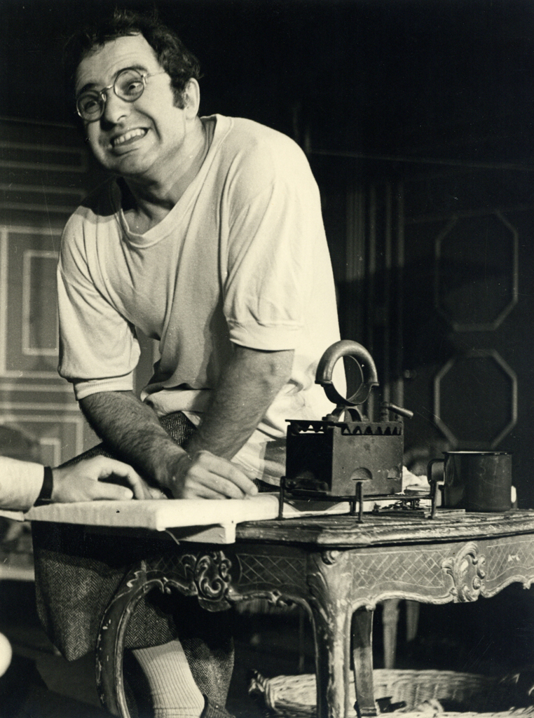 Dušan Jovanović, Znamke, nakar še Emilija …, Drama SNG v Ljubljani. Na fotografiji: Janez Hočevar (Filatelist).